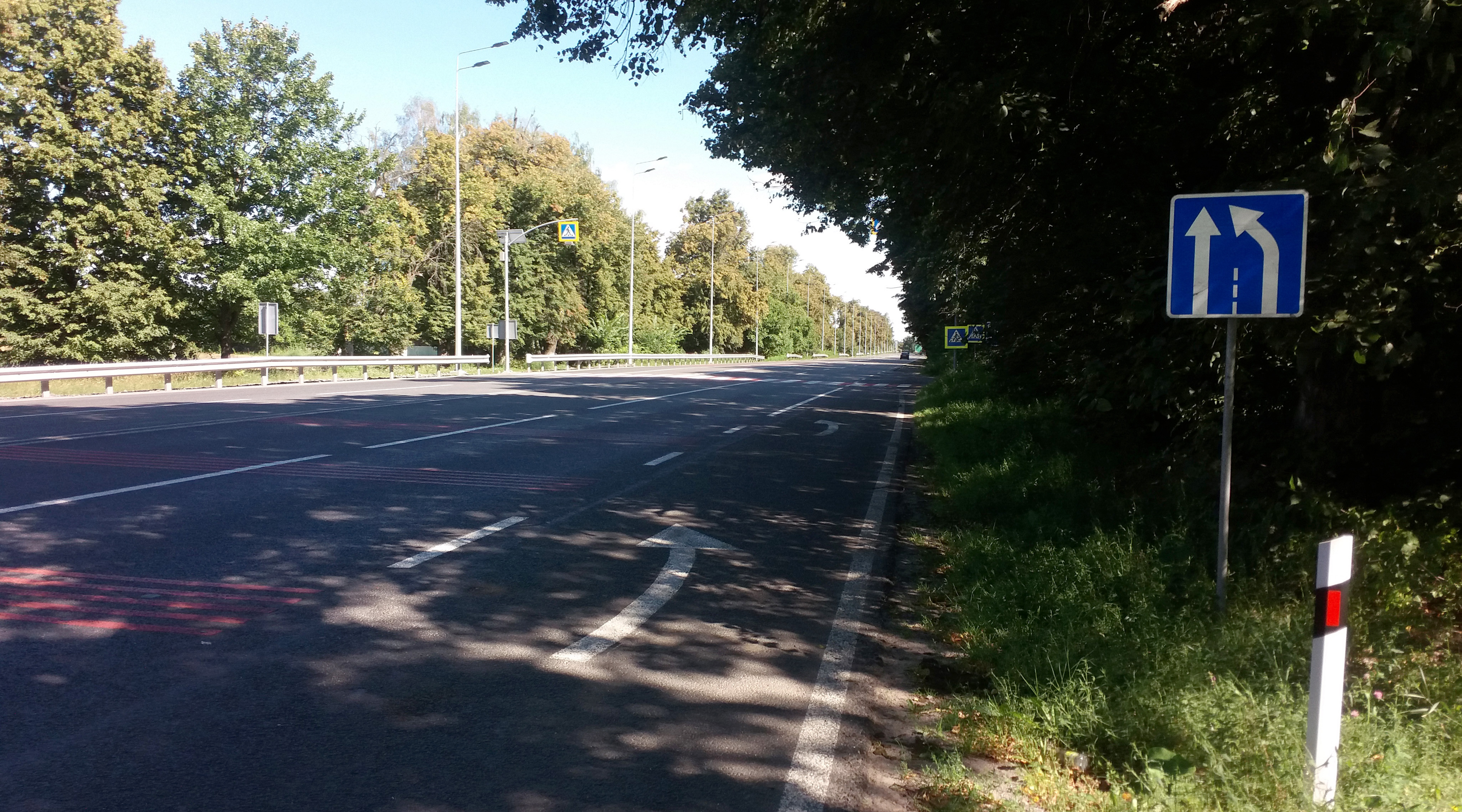 Ділянка дороги М12/Е50 біля села Лукашівка Літинського району Вінницької області, Україна. 8 серпня 2018